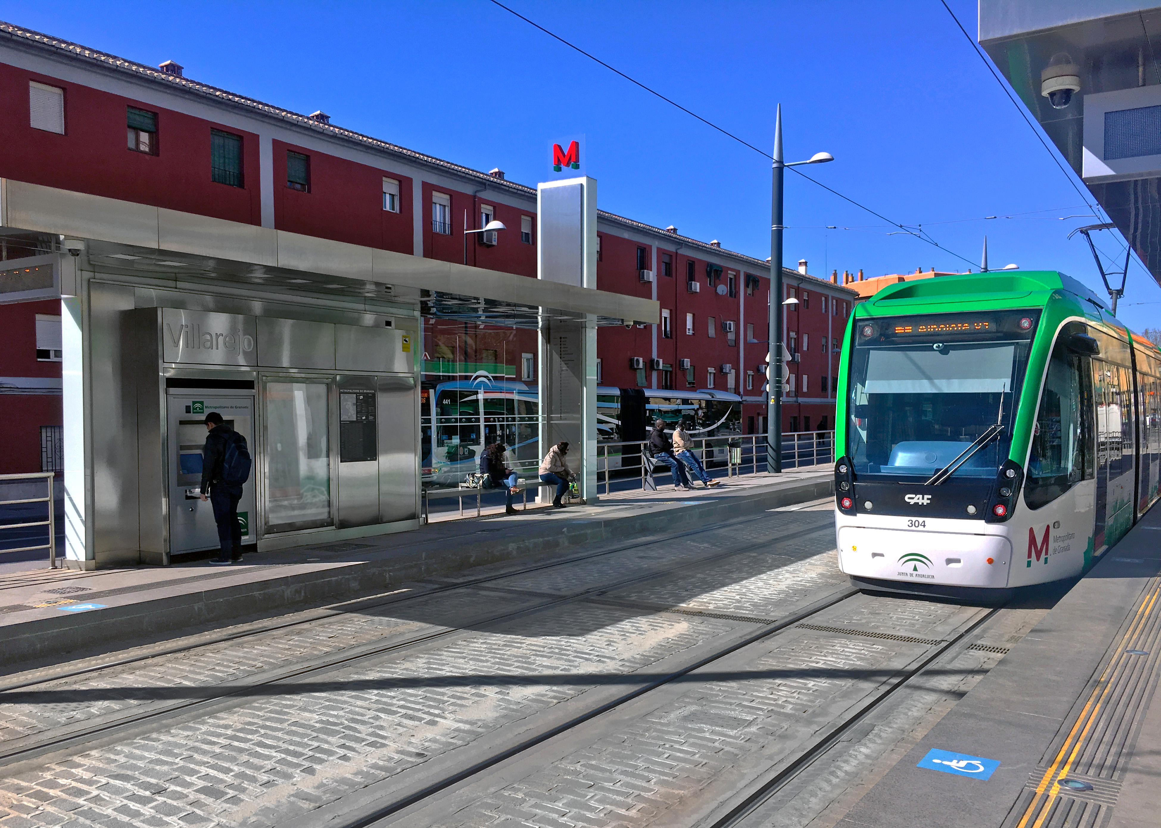 Una unidad CAF Urbos 3 del Metro de Granada en la estación de Villarejo